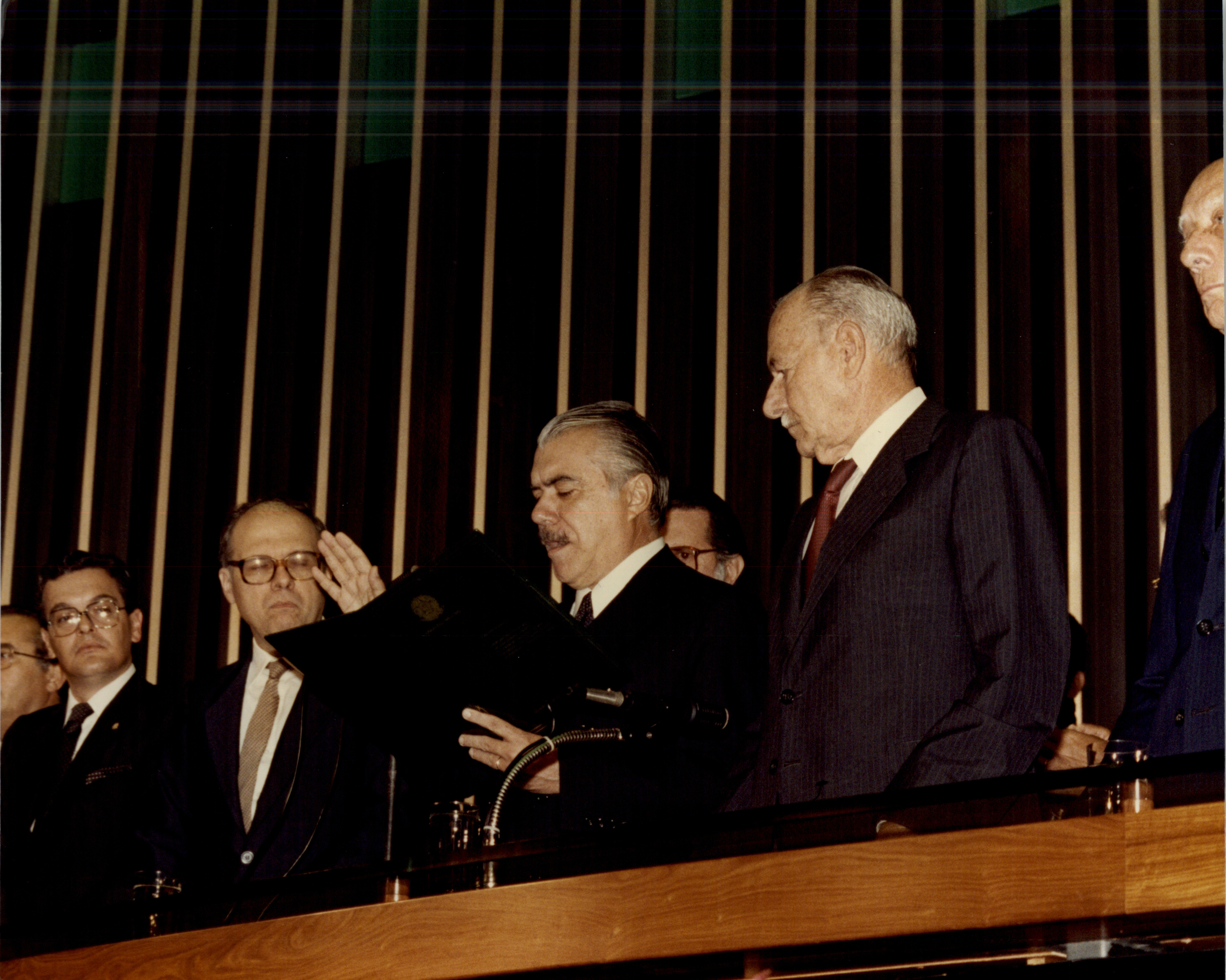 Posse do presidente José Sarney e seu substituto legal Ulysses Guimarães em 15 de março de 1985, em sessão conjunta do Congresso Nacional, presidida pelo senador José Fragelli. Foto: Senado Federal